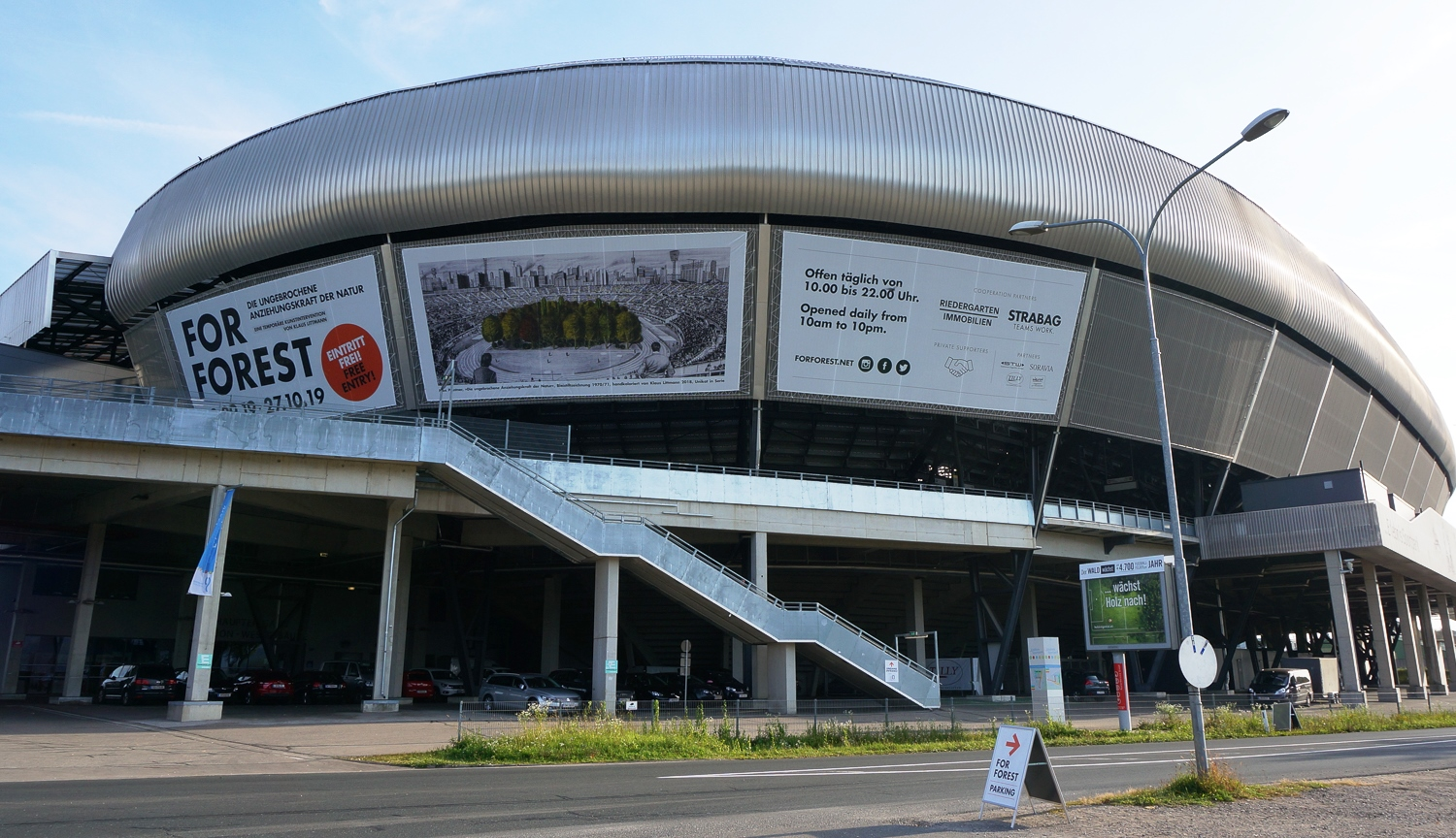 For Forest - Wörtherseestadion, Carinthia, Austria, European Union